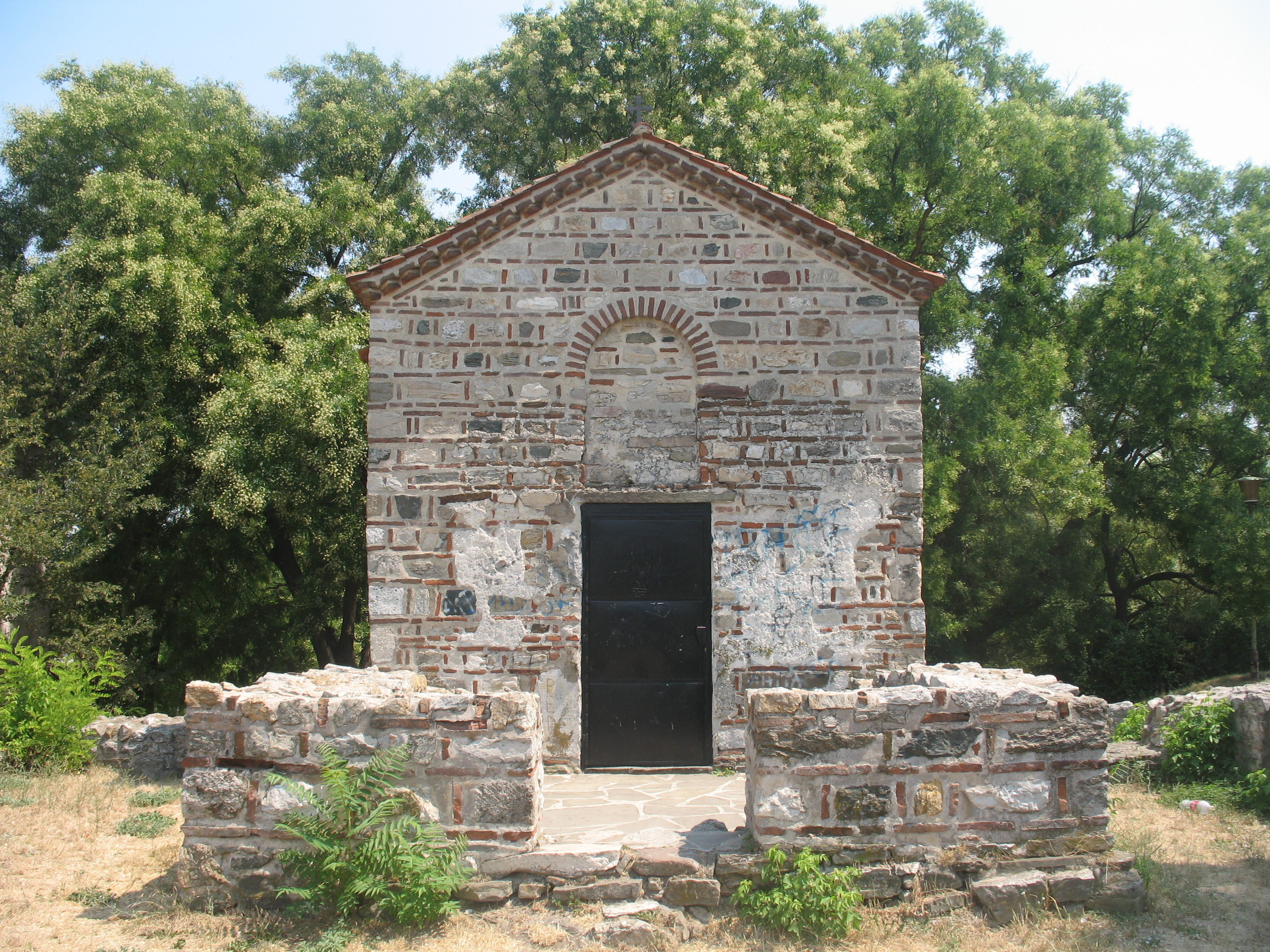 "Latin" church in Prokuplje